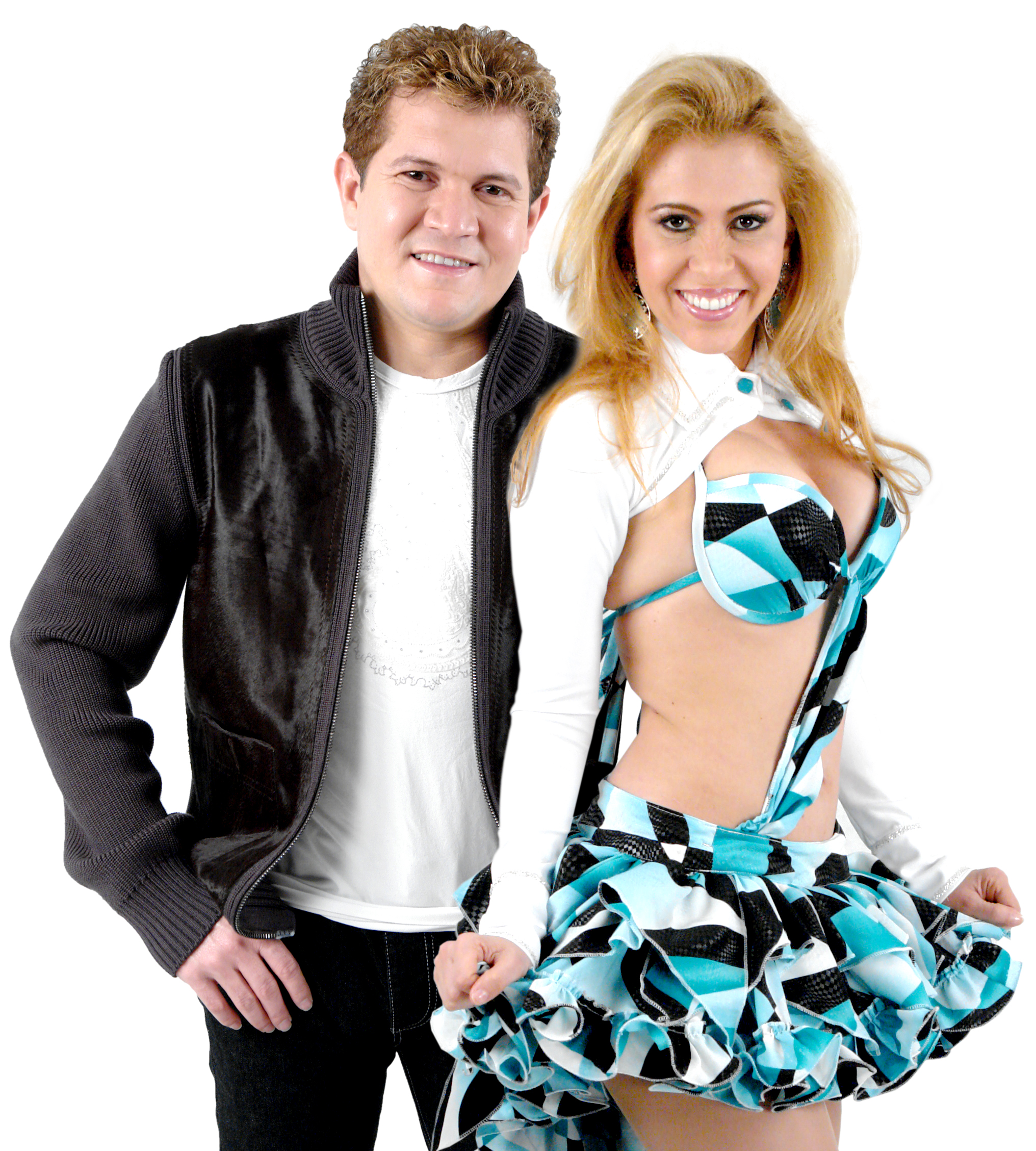 Joelma e Chimbinha, líderes da Banda.